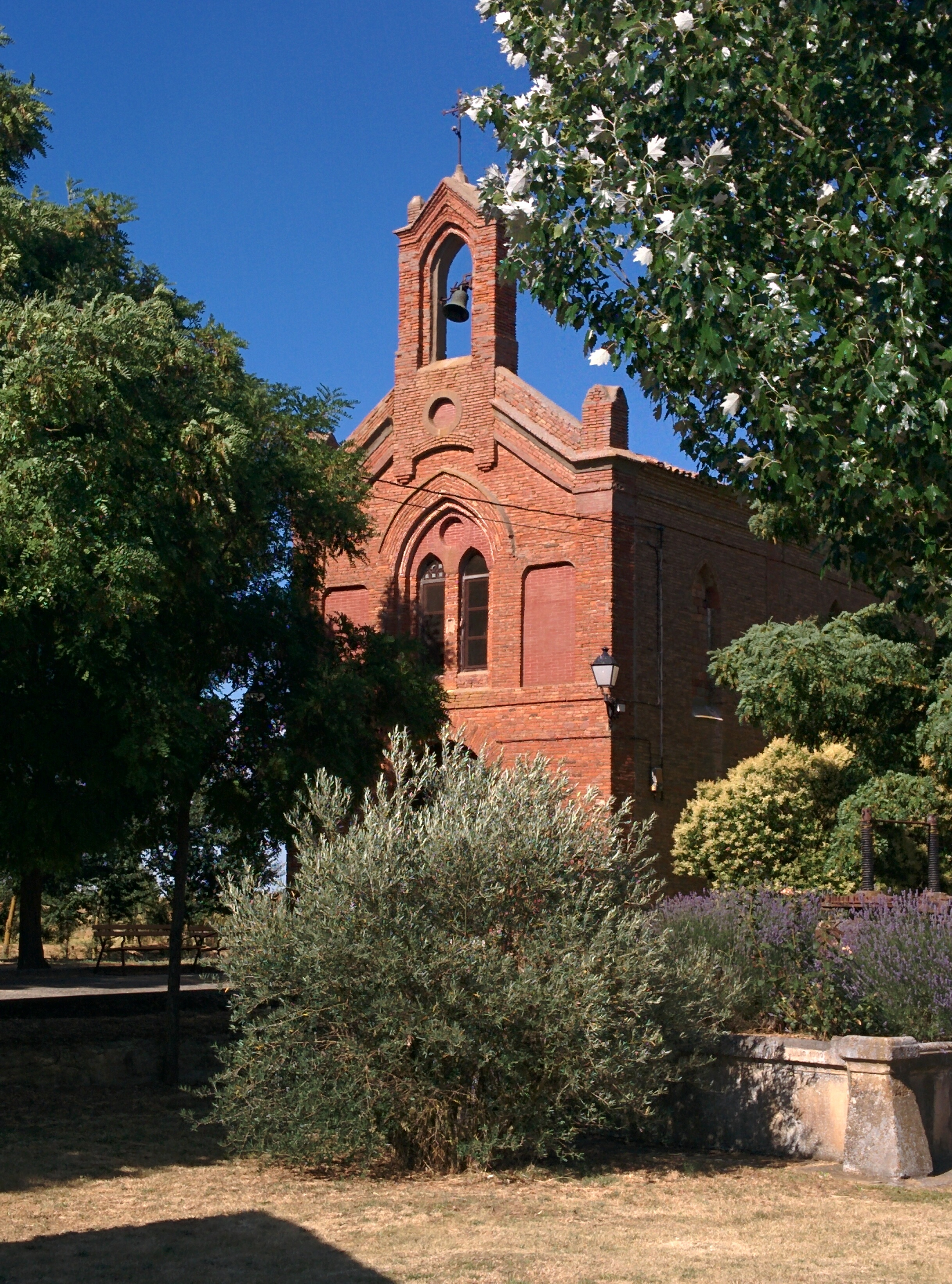 Ermita de la Virgen de la Carrera, en Villacidaler (Palencia, España).